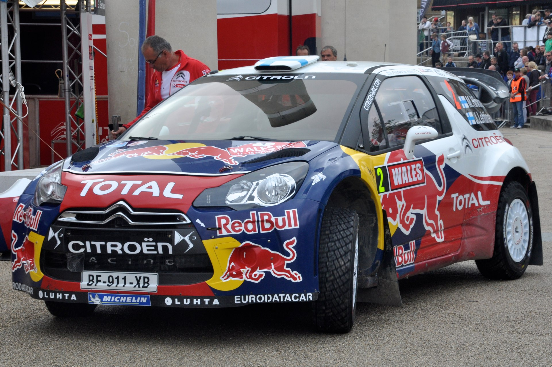 Driven by Mikko Hirvonen